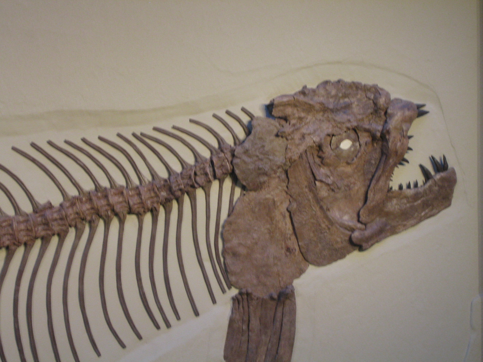 Xiphactinus audax in Cosmocaixa, Barcelona